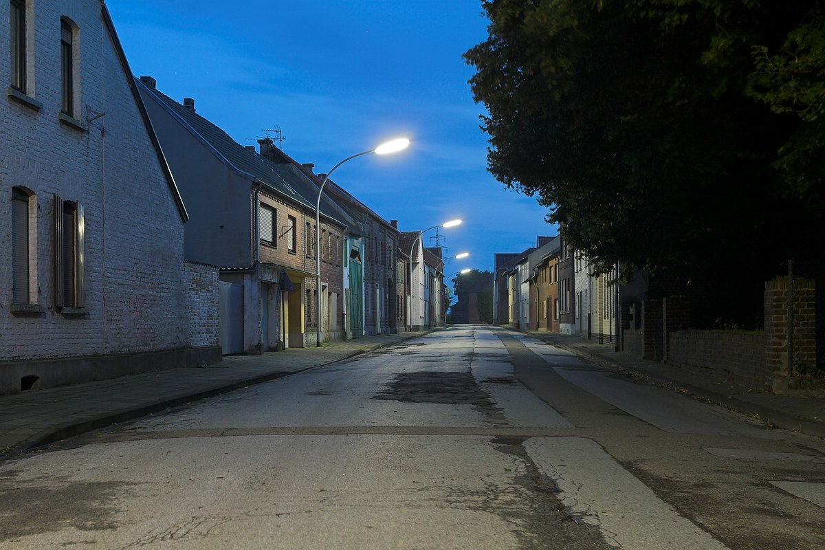 Holz im Juli 2007 am späten Abend. Die Stille im Ort wirkt drückend und gespenstisch. Die wenigen Bewohner, die dort noch ansässig sind, untermauern den Eindruck noch etwas.